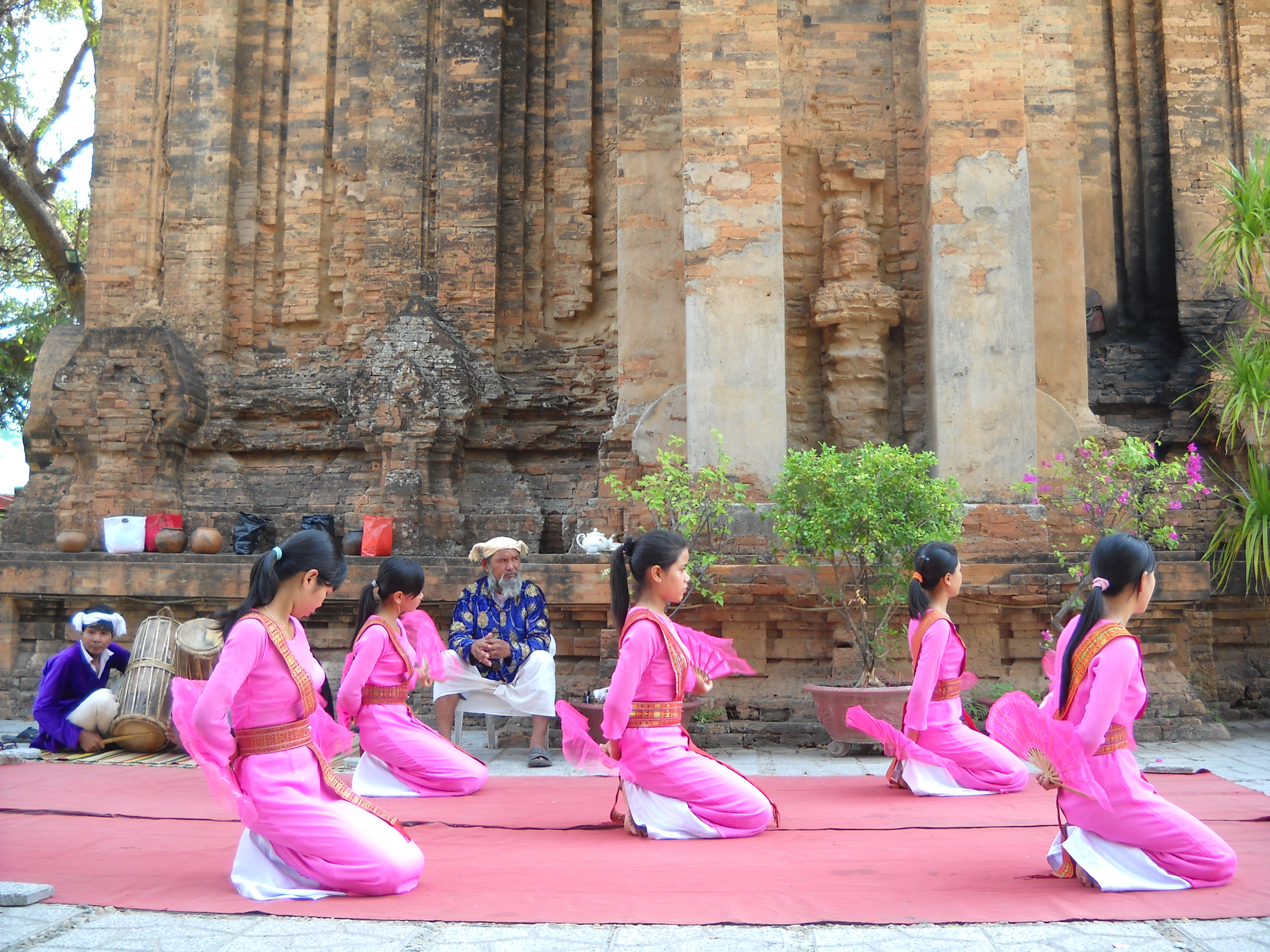 Các cô gái Chăm trong đội vũ công Phan Rang đang biểu diễn một điệu múa truyền thống dưới chân tháp Chăm. Bên trái có một nhạc công đang chơi trống Ginăng.